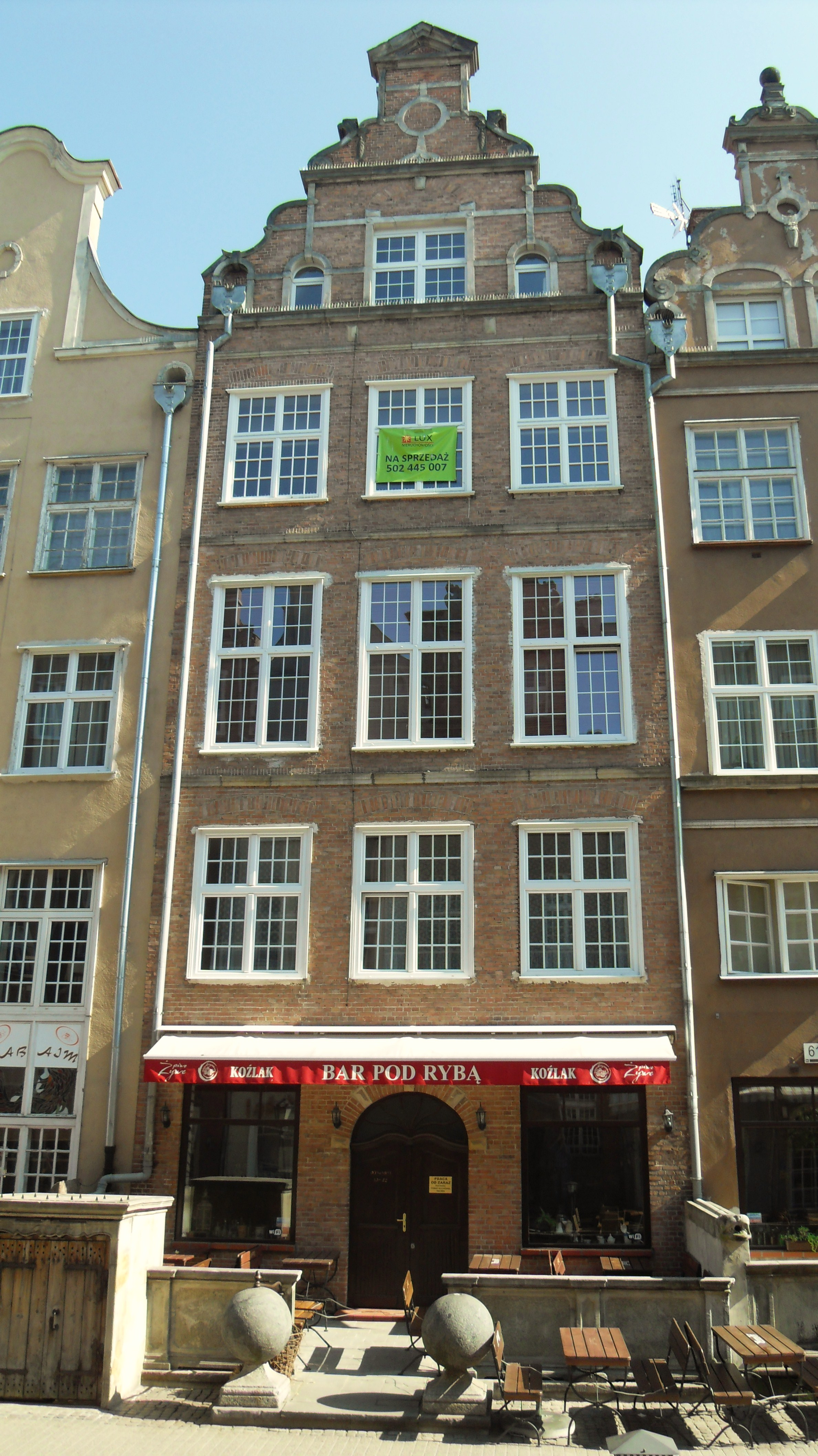 Gdańsk Główne Miasto, ul. Piwna 63. (zabytek nr rejestr. 754)